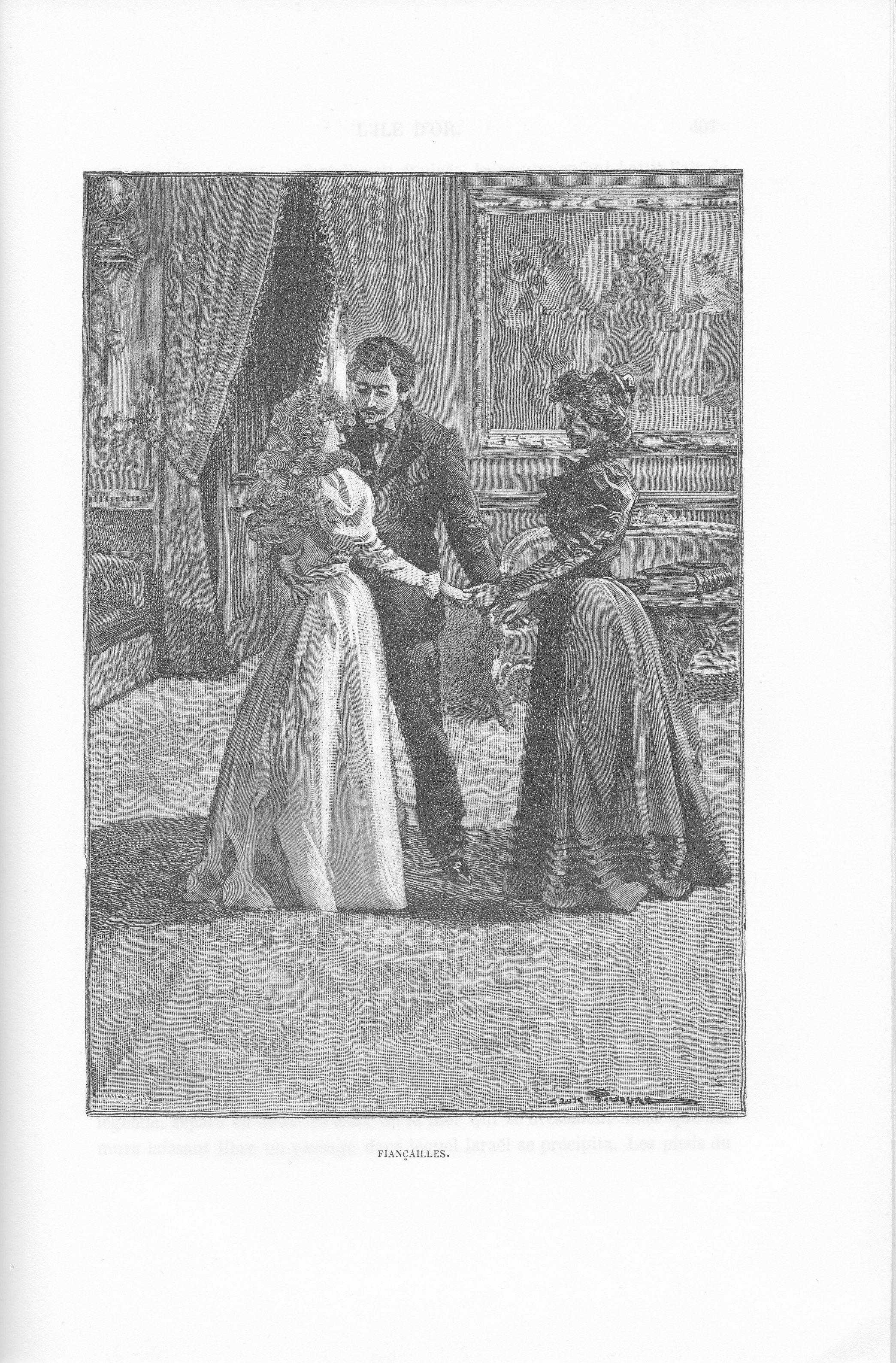 "Fiançailles", gravure d'un roman de Louis Tinayre pour le roman de Paul d'Ivoi "Corsaire Triplex" (1898). Illustration figurant dans la seconde partie du roman, au chapitre 12.